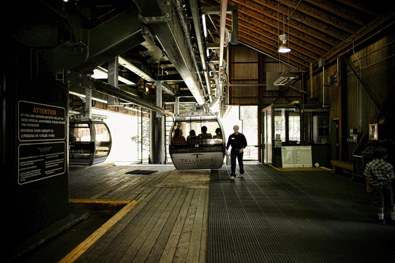 telluride